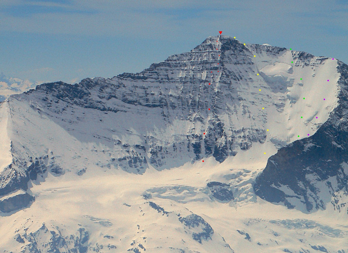 Parete nord della Grande Casse ripresa dal Monte Pourri con indicazione delle vie di salita. In violetto è indicata la Petite face nord, in giallo il Couloir des italiens, in verde la Moyenne face nord ed in rosso la via Boivin - Diaféria - Maurin.